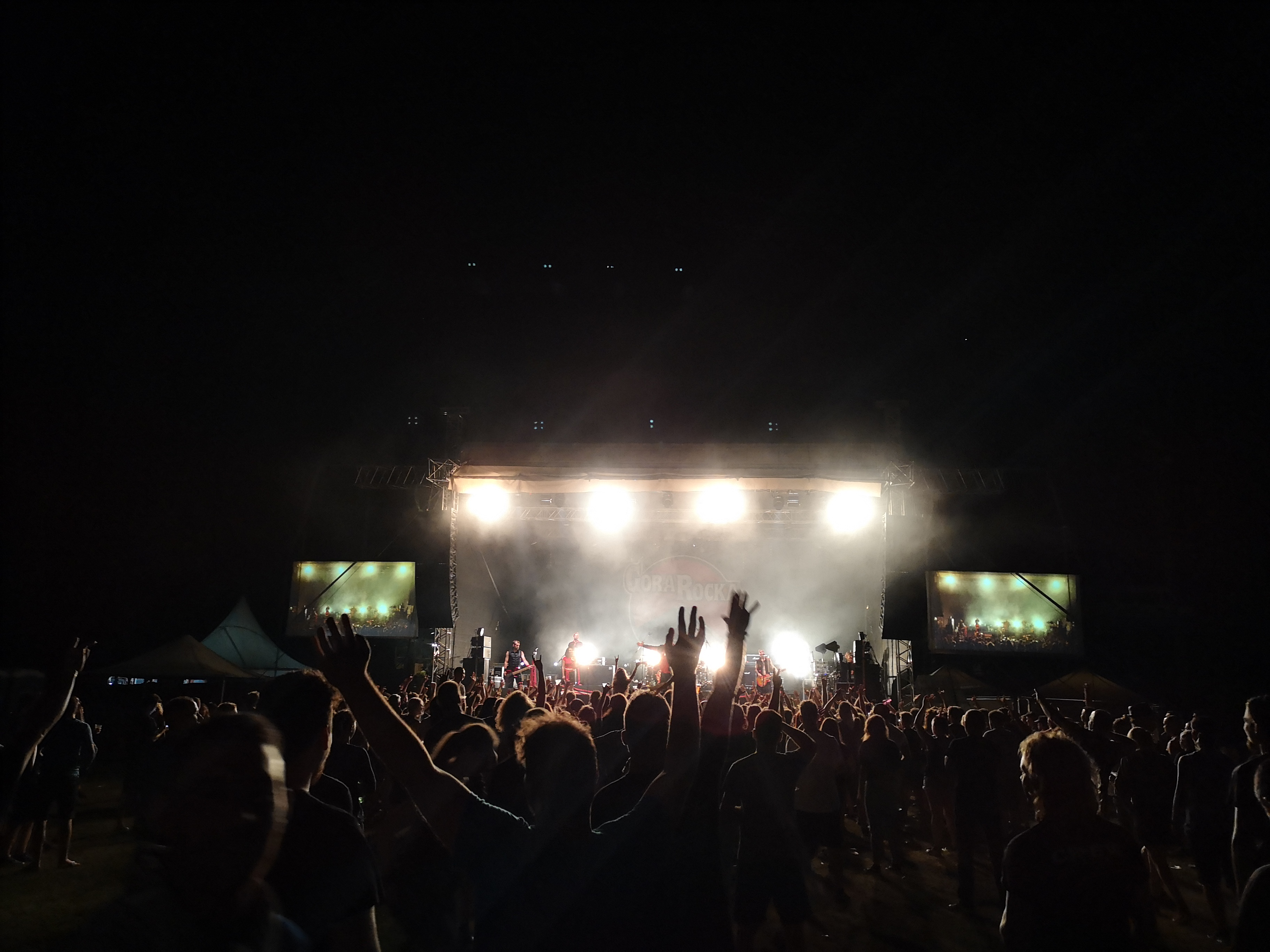 Slika prikazuje publiko in oder na enem izmed slovenskih glasbenih festivalov.